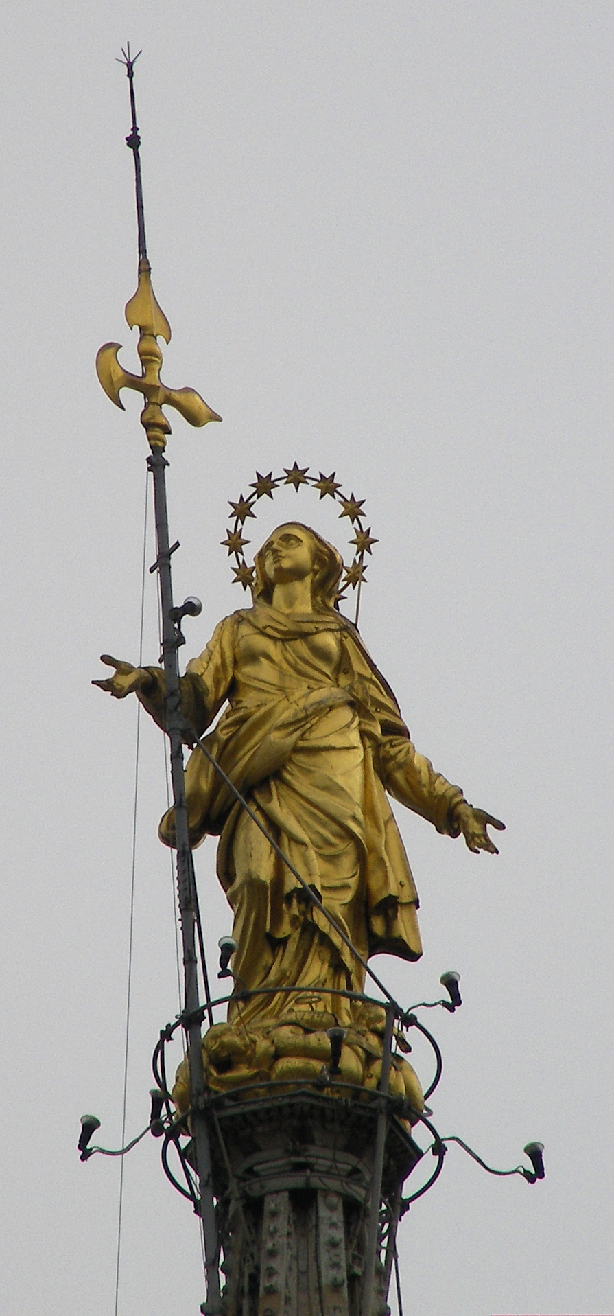 Duomo di Milano: la Madonnina